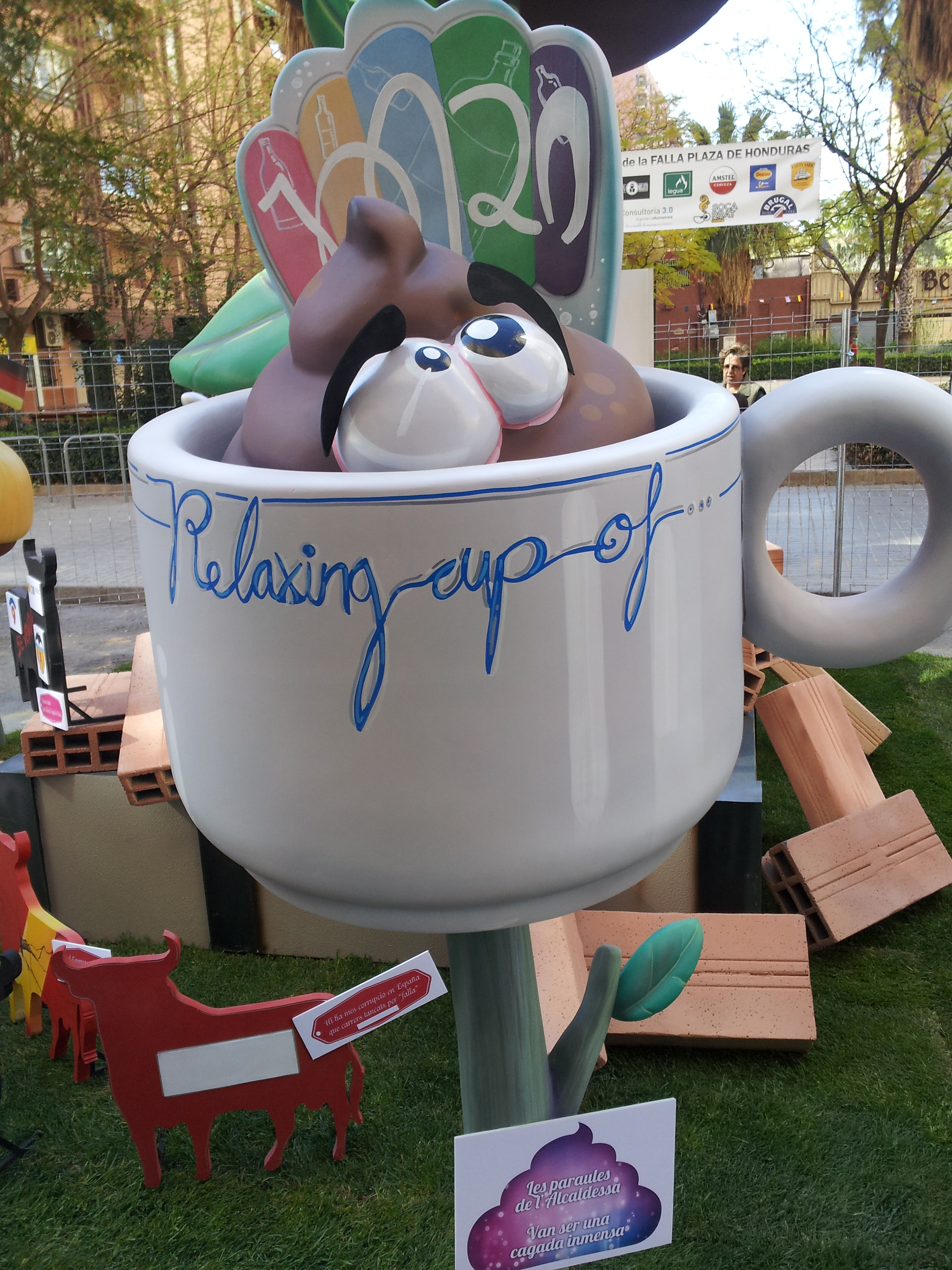 Ninot faller parodiant la candidatura olímpica de Madrid 2020 i el discurs d'Ana Botella amb el "Relaxing Cup of Café con leche".